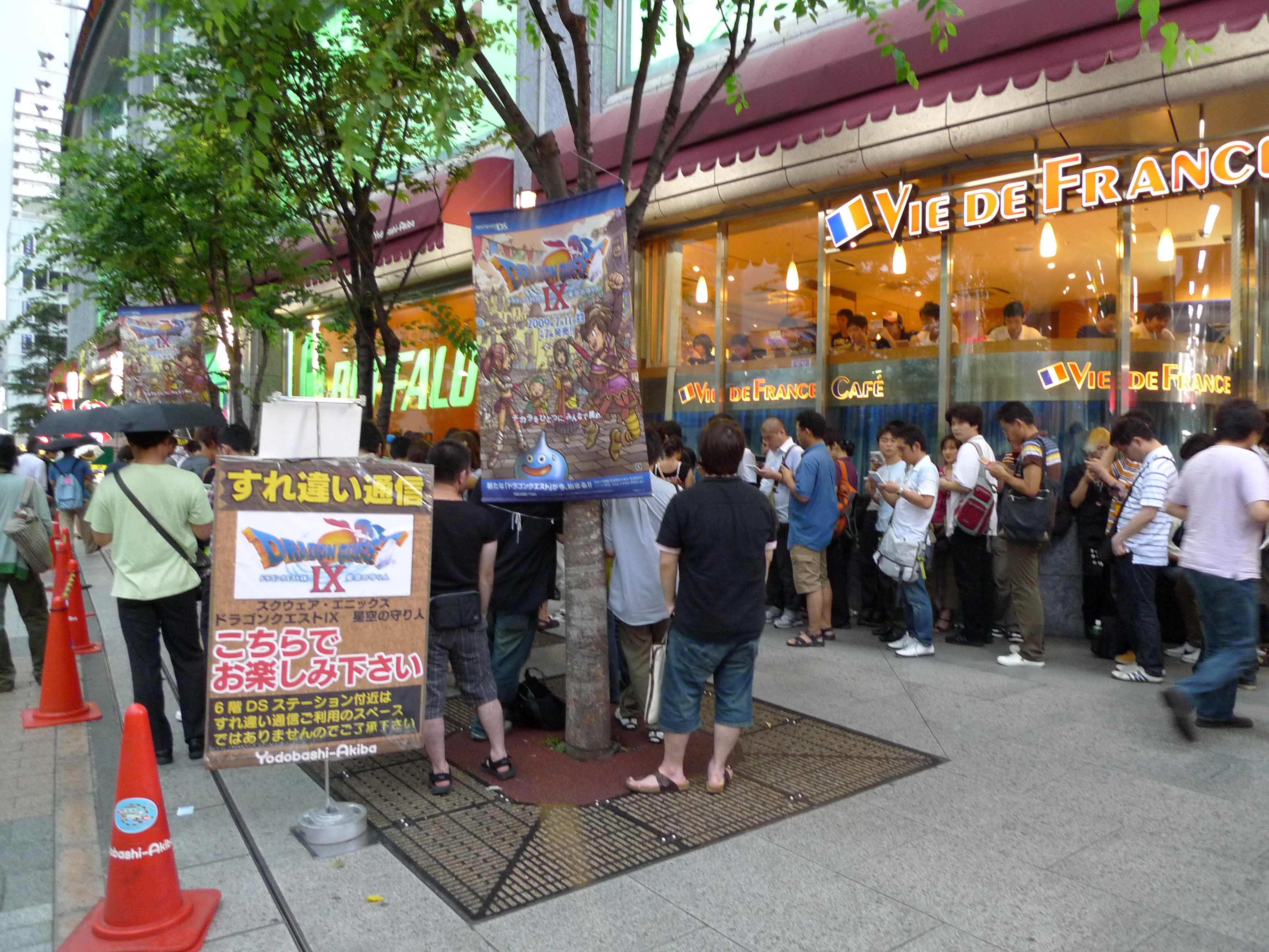 Yodobashi Akiba Surechigai tushin DQ9